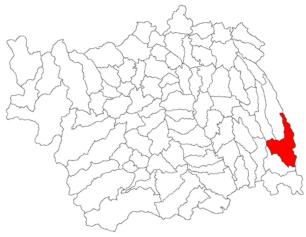 Categorie:Hărţi ale judeţului Bacău